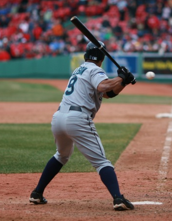 Jason Ellison